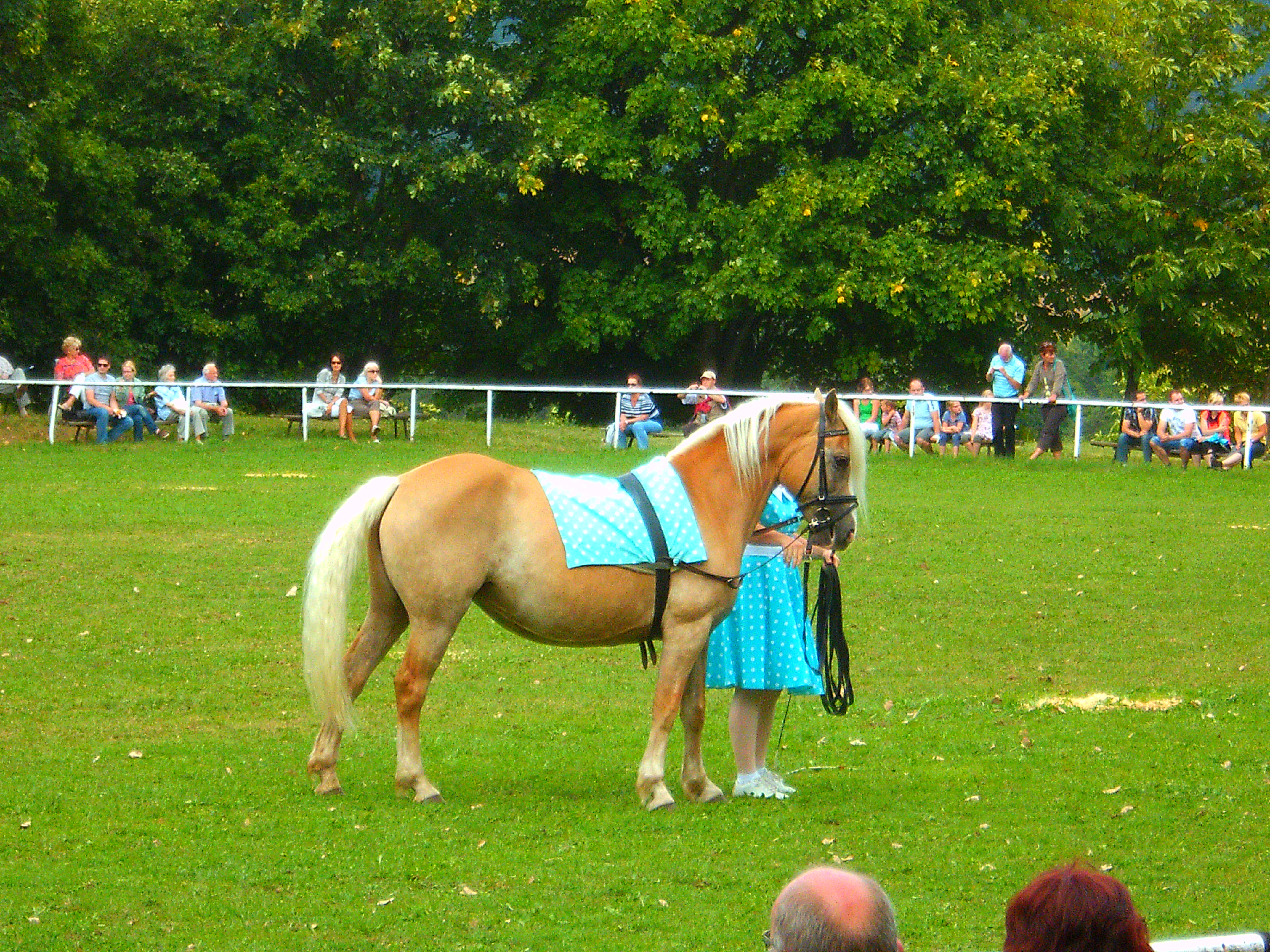 Edelbluthaflinger und Haflinger im Haflingergestüt Meura